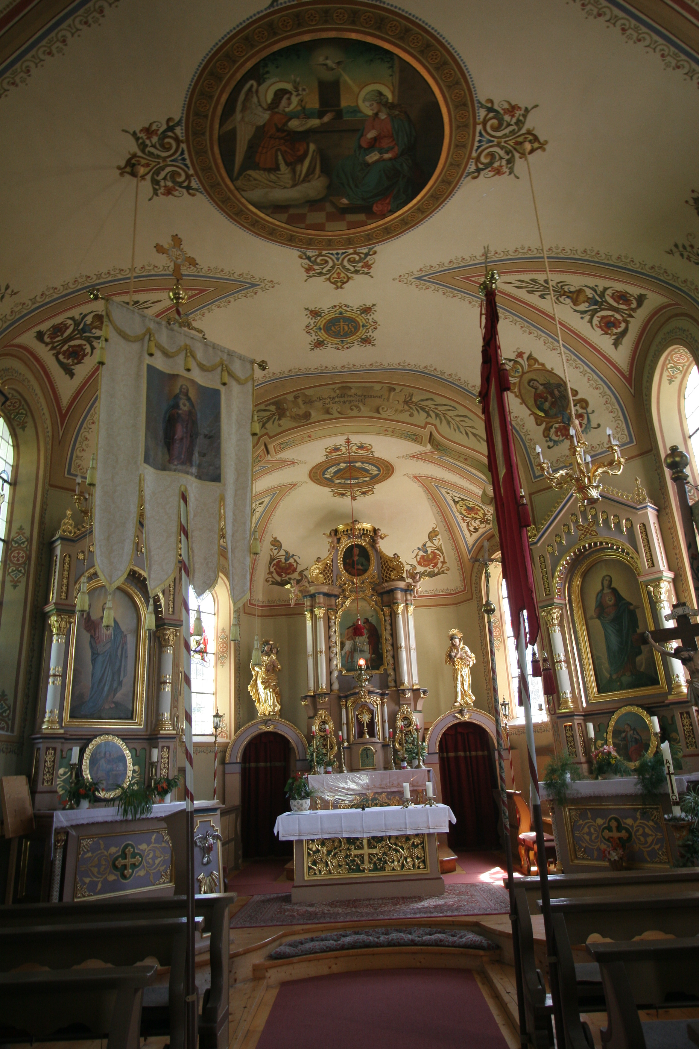 view of Gramais